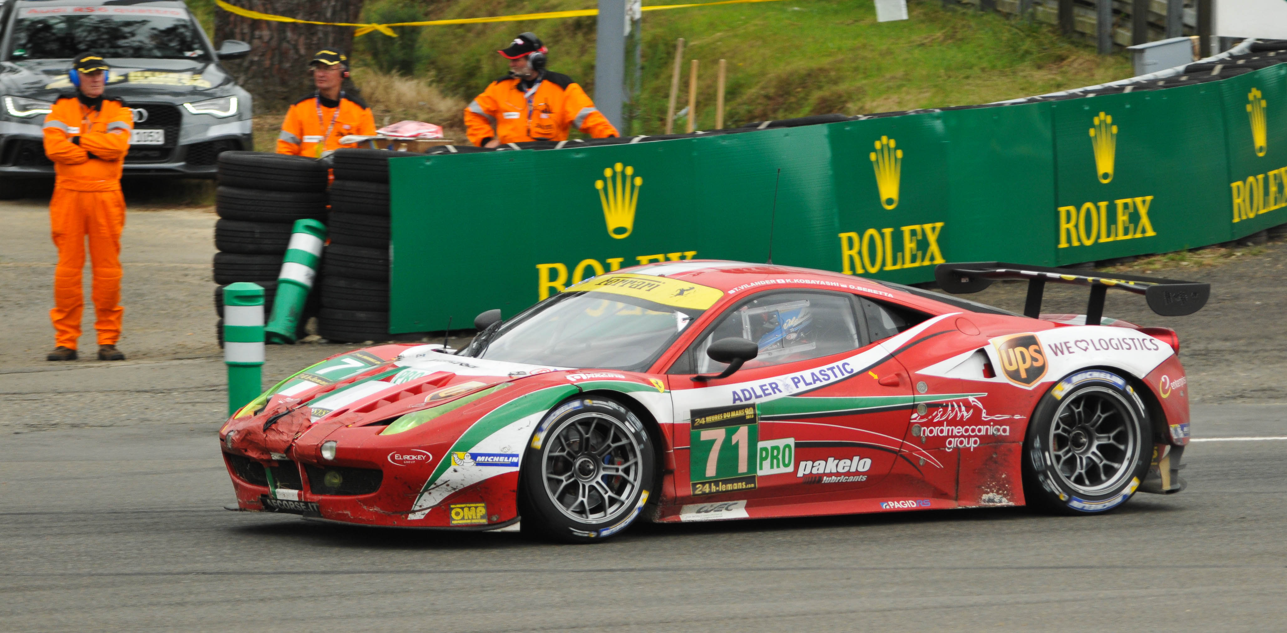 Le Mans 2013